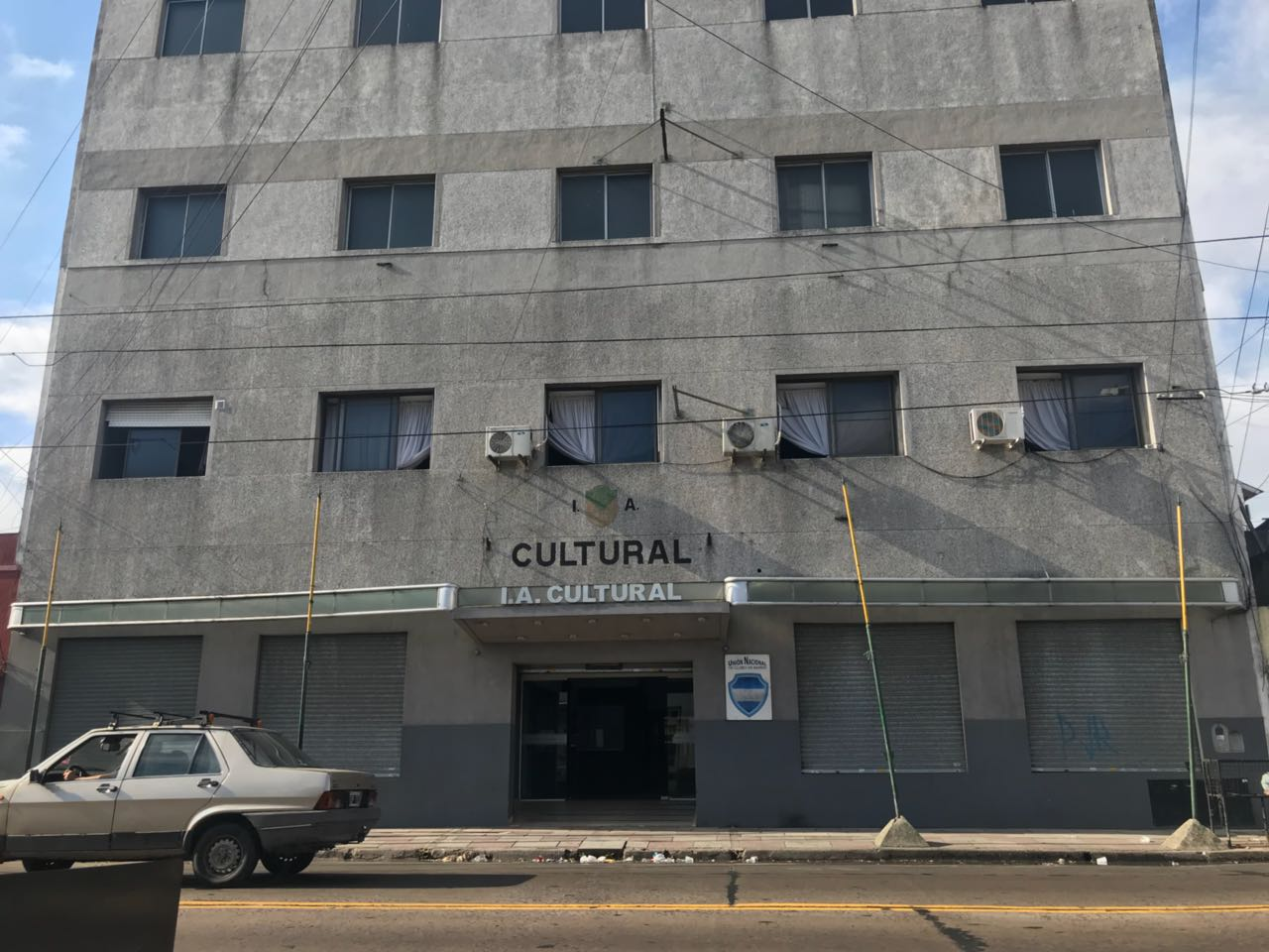 Club Cultural